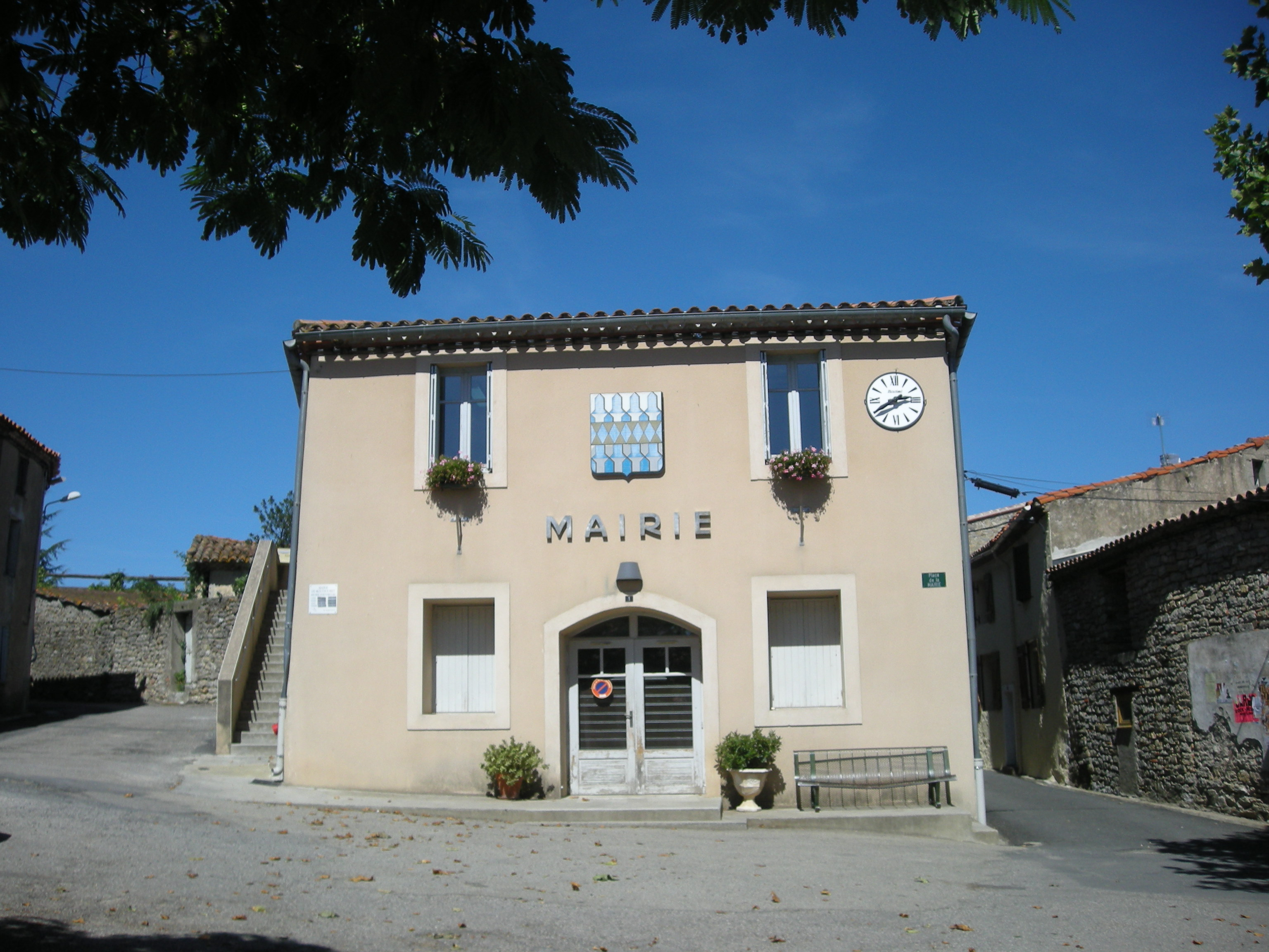 Mairie de mouthoumet (aude)